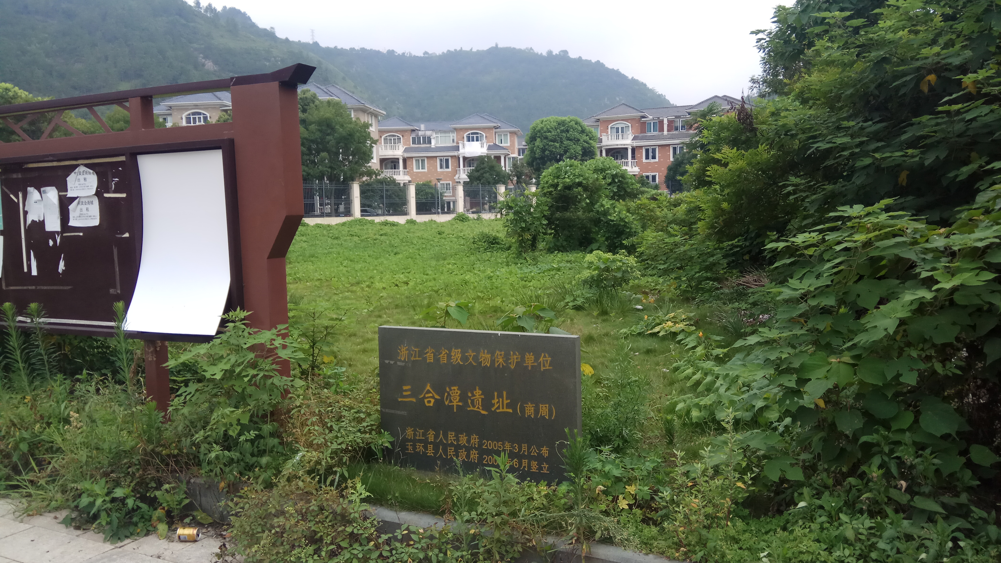 中文（中国大陆）: 三合潭遗址